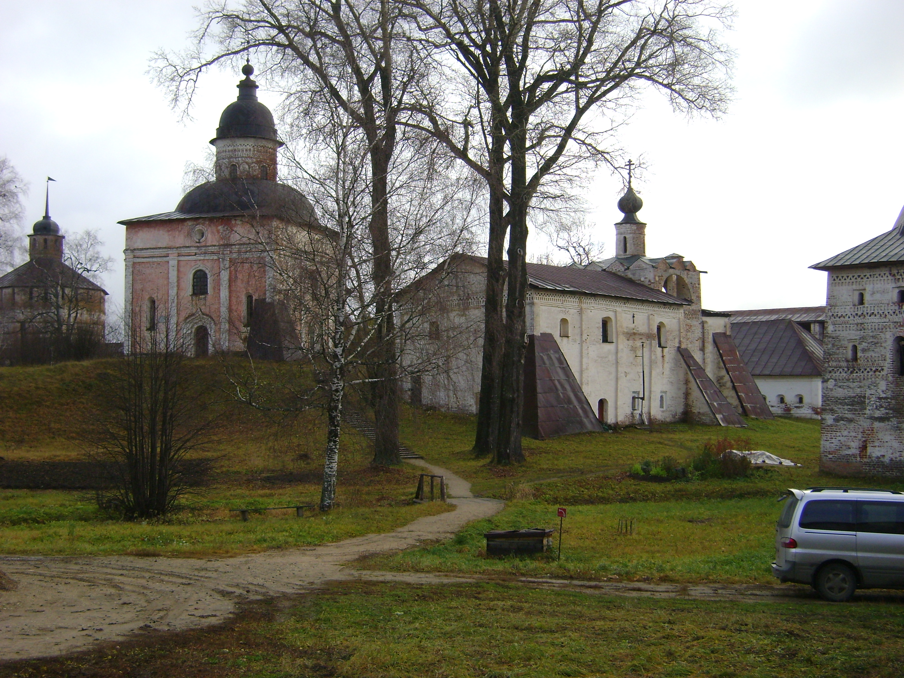 Общий вид Ивановского монастыря, Кирилло-Белозерский монастырь